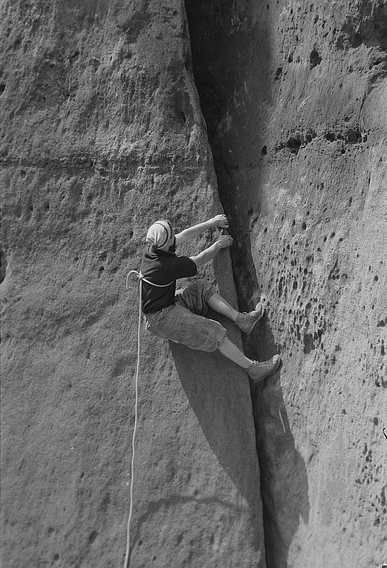 Original image description from the Deutsche FotothekSächsische Schweiz. Kletterer in einem Hangelriß - Ostervorturm (Schrammsteine)